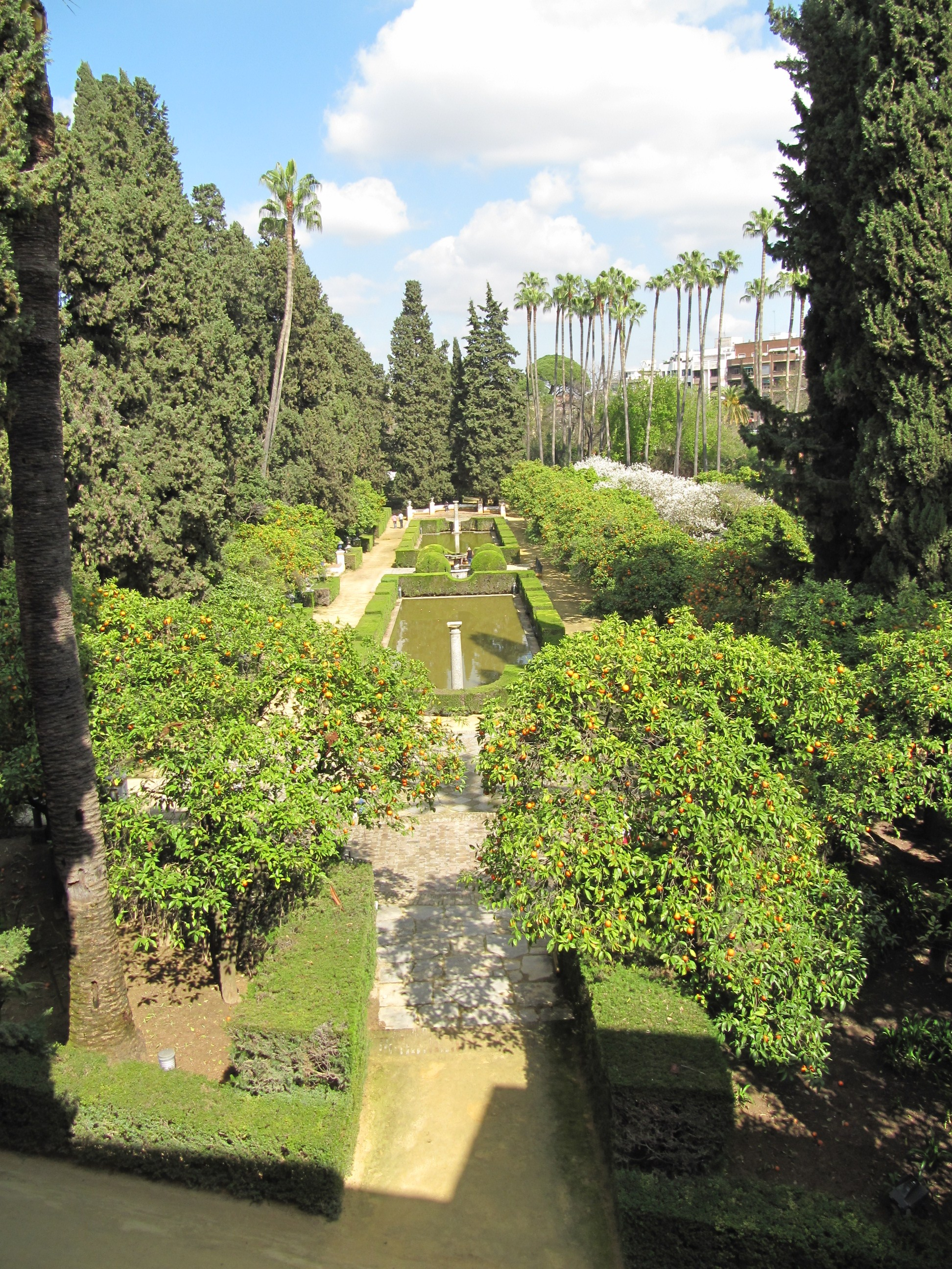 Sevilla - March 2011 - 054.jpg. Jardín de los Poetas (Alcázar de Sevilla)